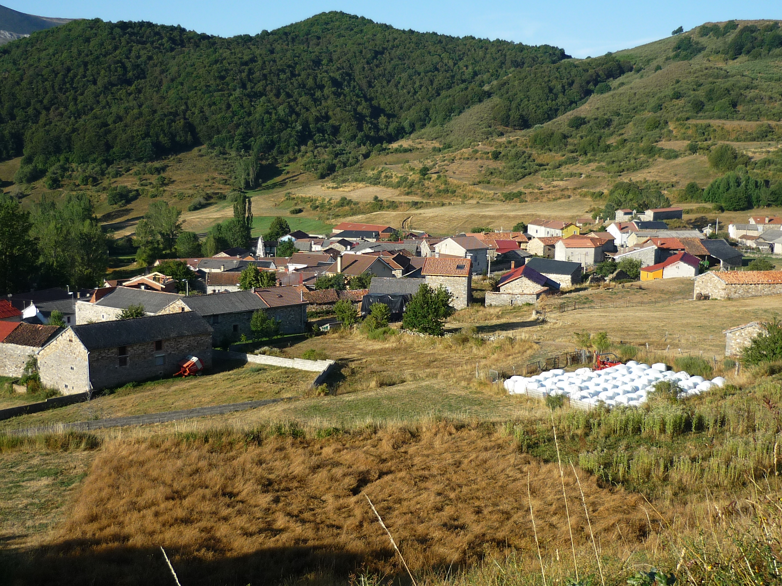 Panorámica de Polvoredo desde lo alto del Rondín.